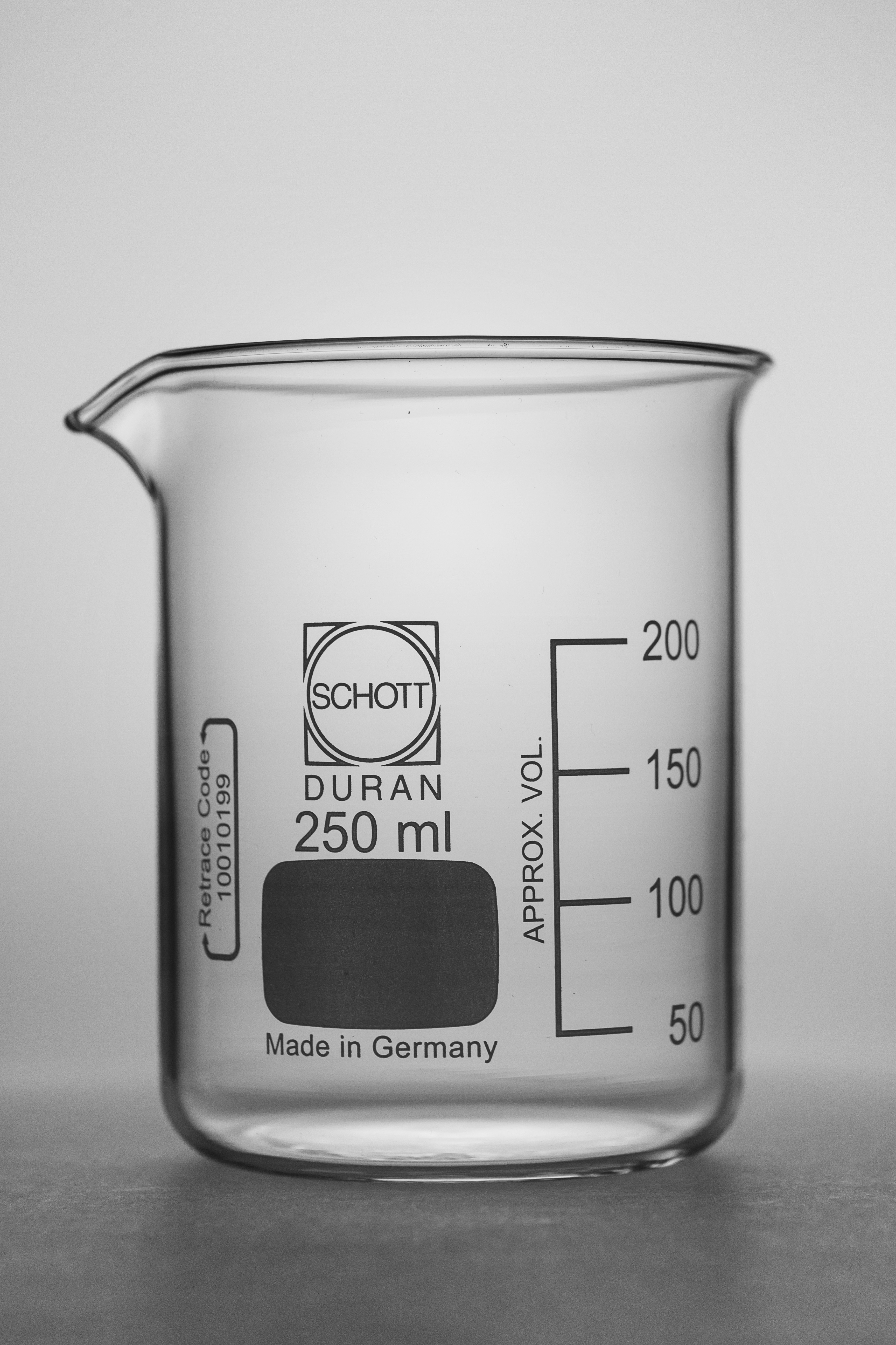 Duran Becherglas 250ml niedrige Form